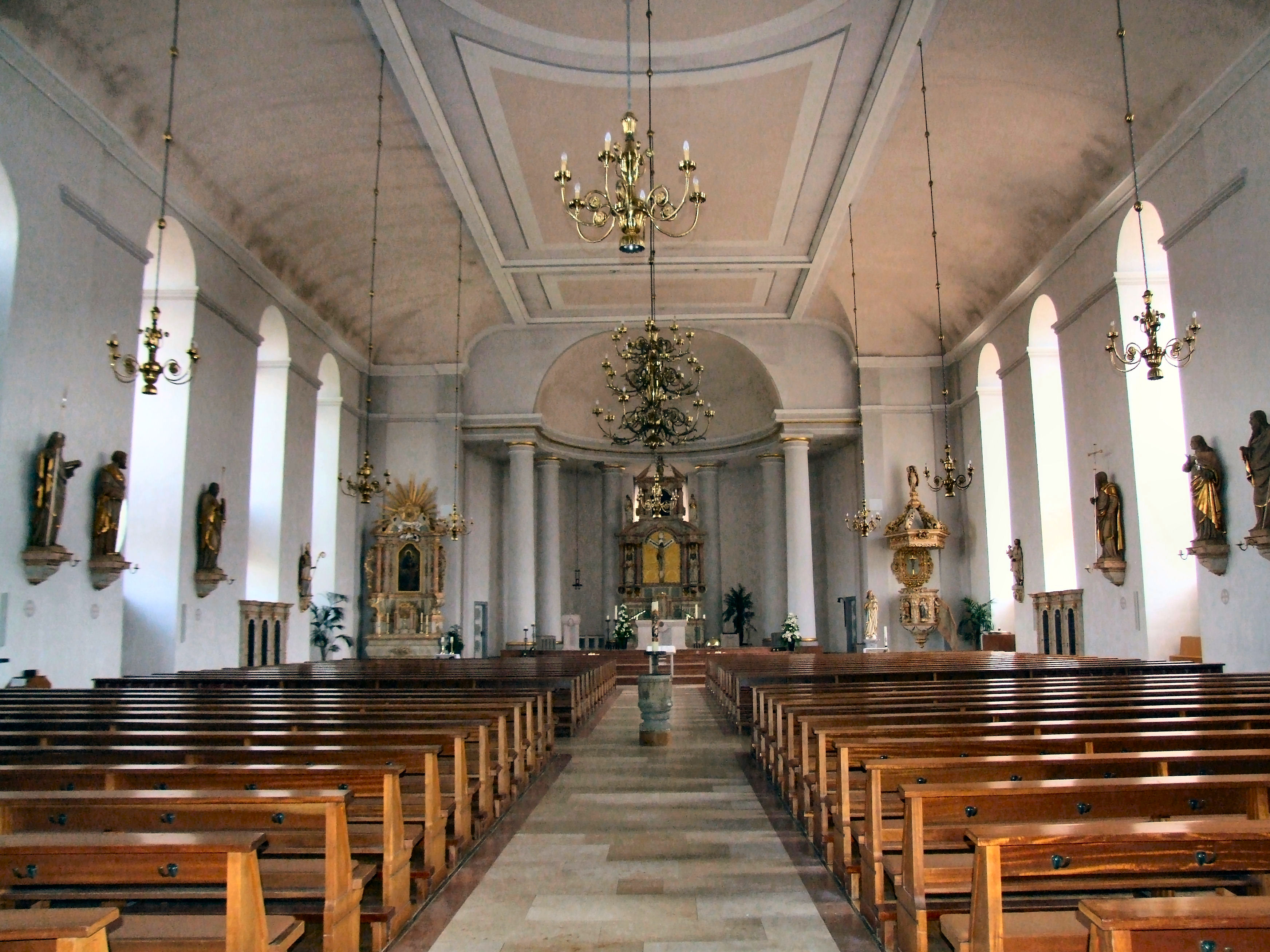 Pfarrkirche St. Vitus in Löningen